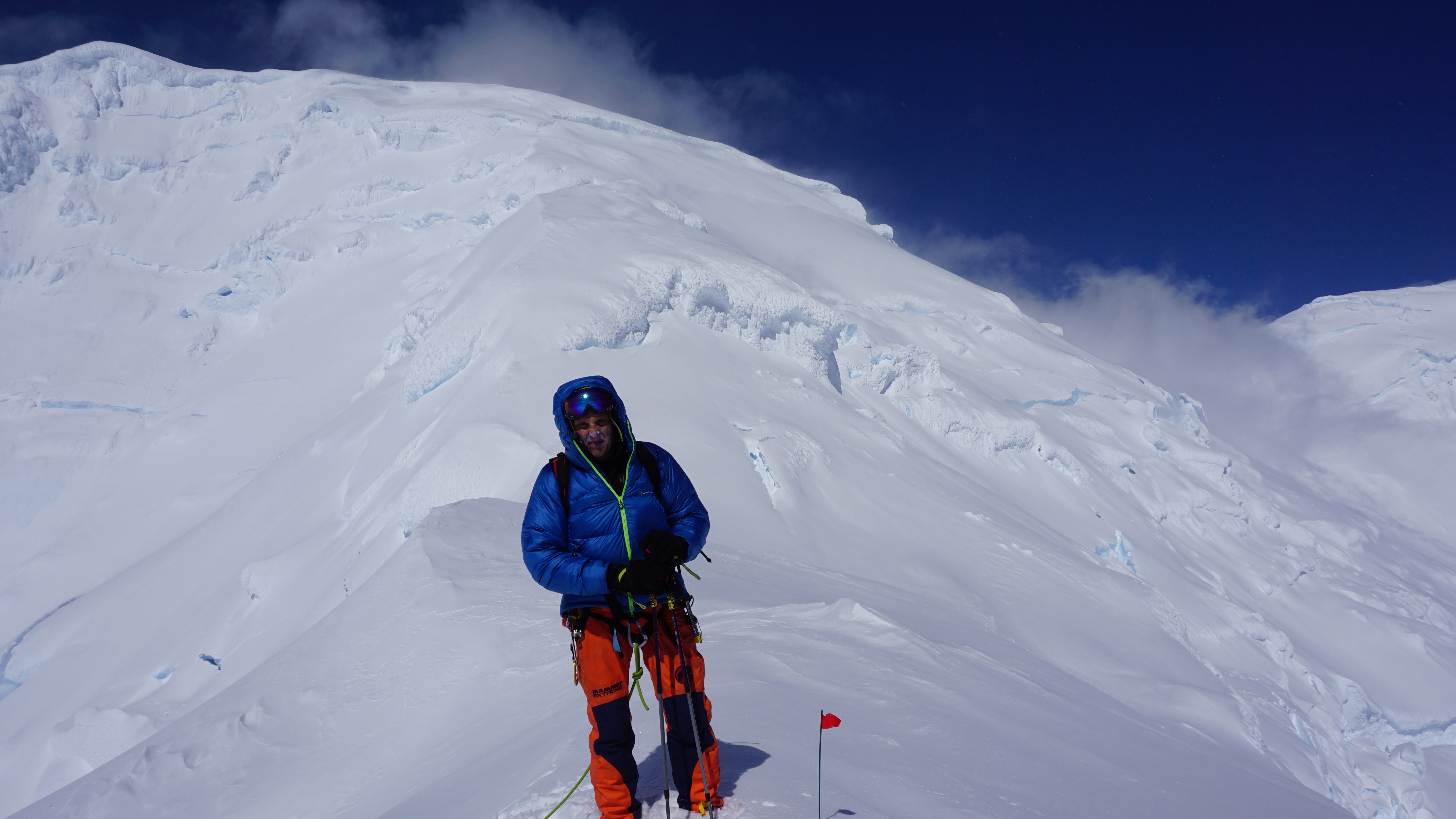 Академия